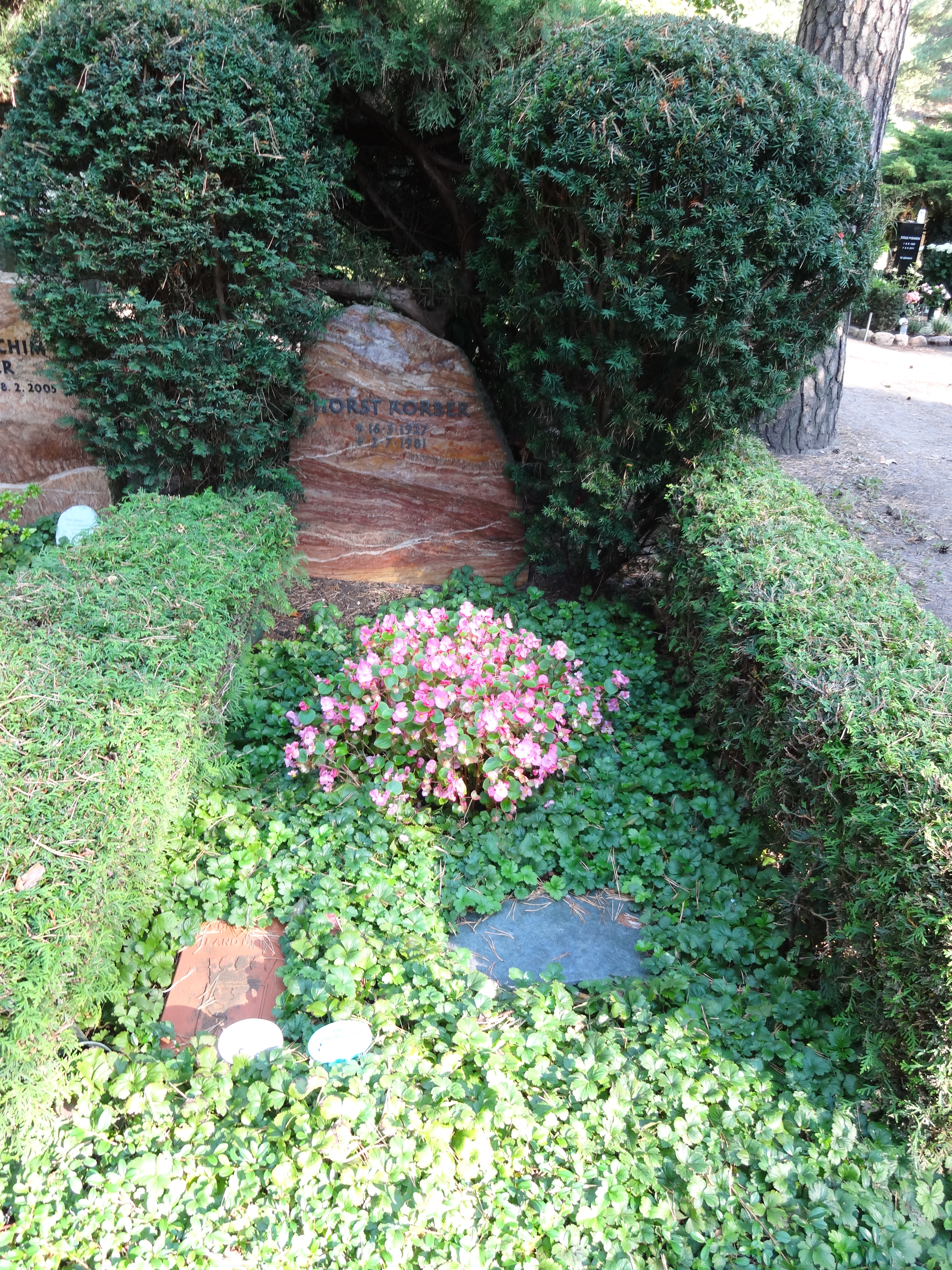 Ehrengrab für Korber, Horst auf dem Waldfriedhof Dahlem; der Friedhof ist ein Gartendenkmal in BerlinThis is a photograph of an architectural monument.